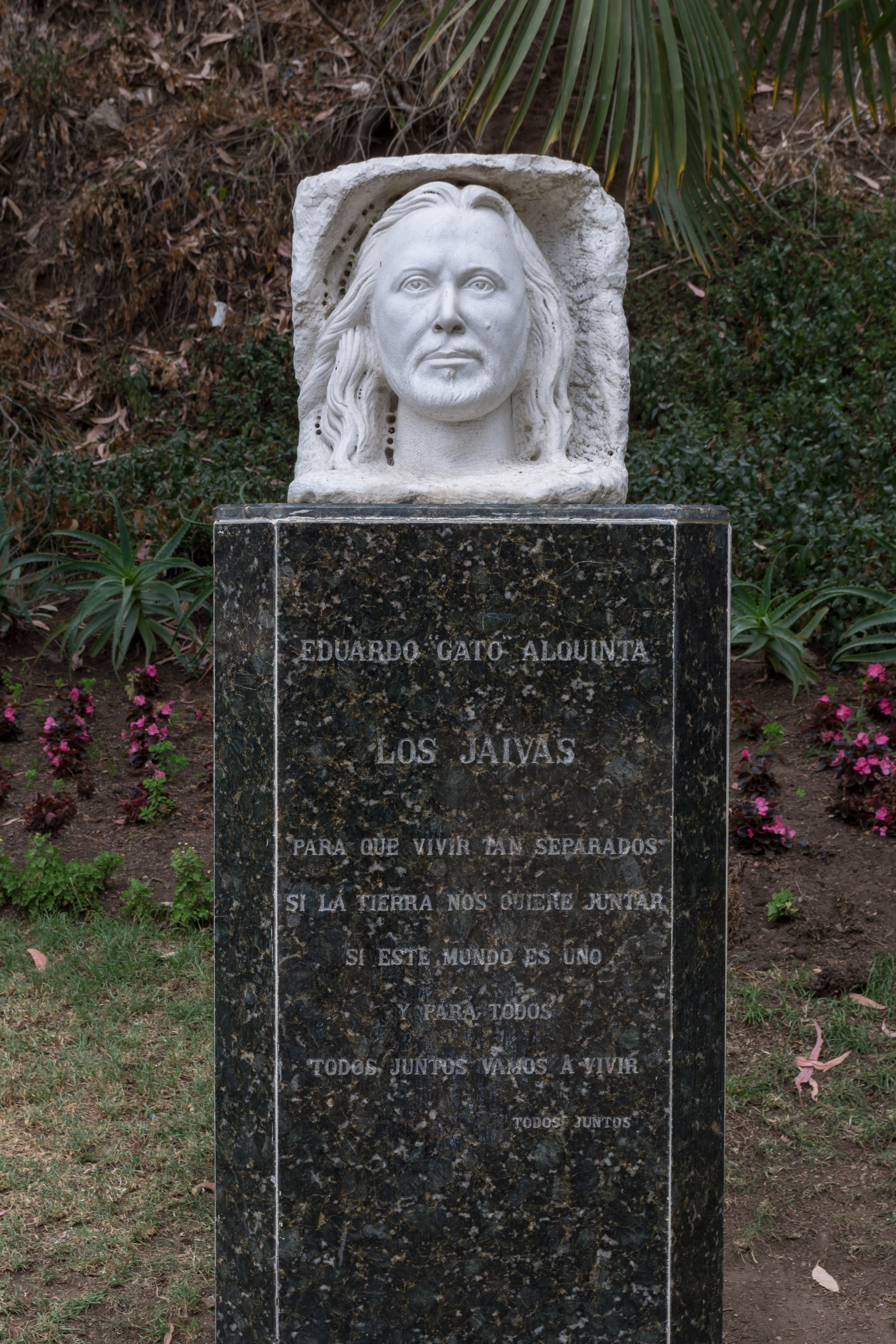 Monumento Eduardo Alquinta, Quinta Vergara, Viña del Mar, Región de Valparaíso, Chile